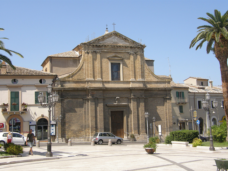 Vasto